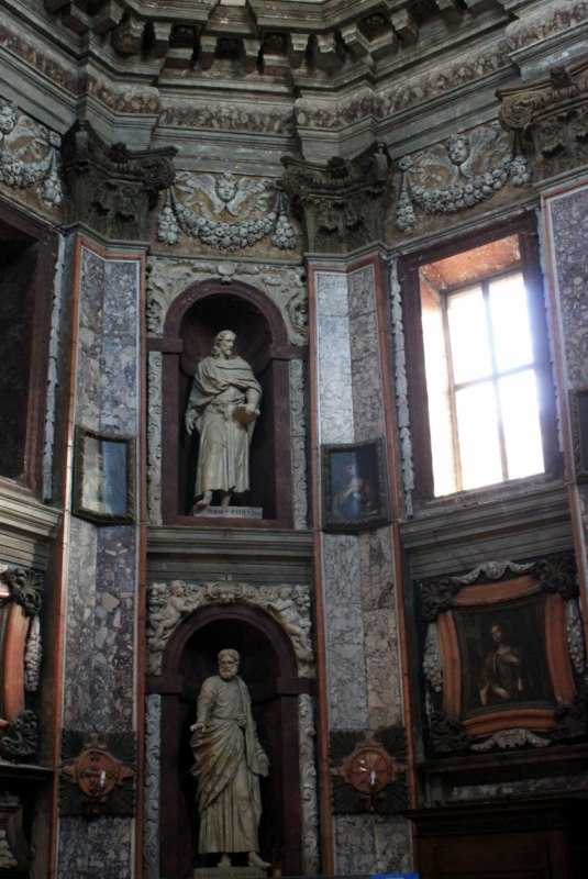 Chiesa di San Gaetano a Padova